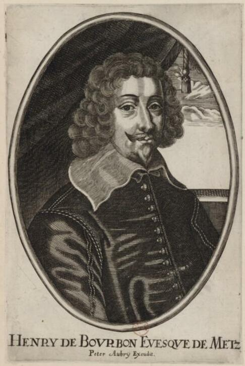 Portrait de Henry de Bourbon, évesque de Metz, en buste, de 3/4 dirigé à droite, dans une bordure ovale : estampe